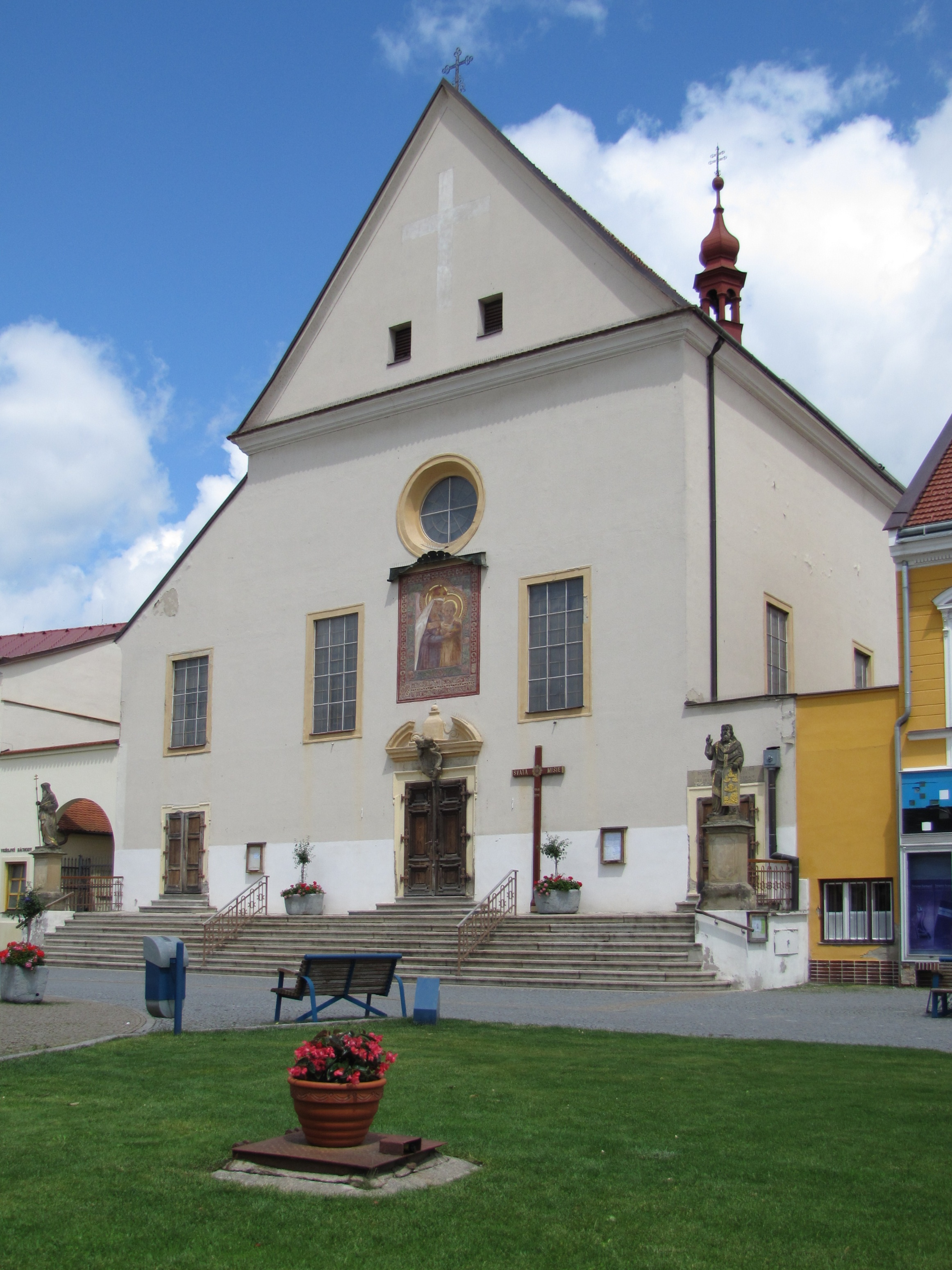 Kostel Nanebevzetí Panny Marie z let 1713–1720. Kyjov, okres Hodonín